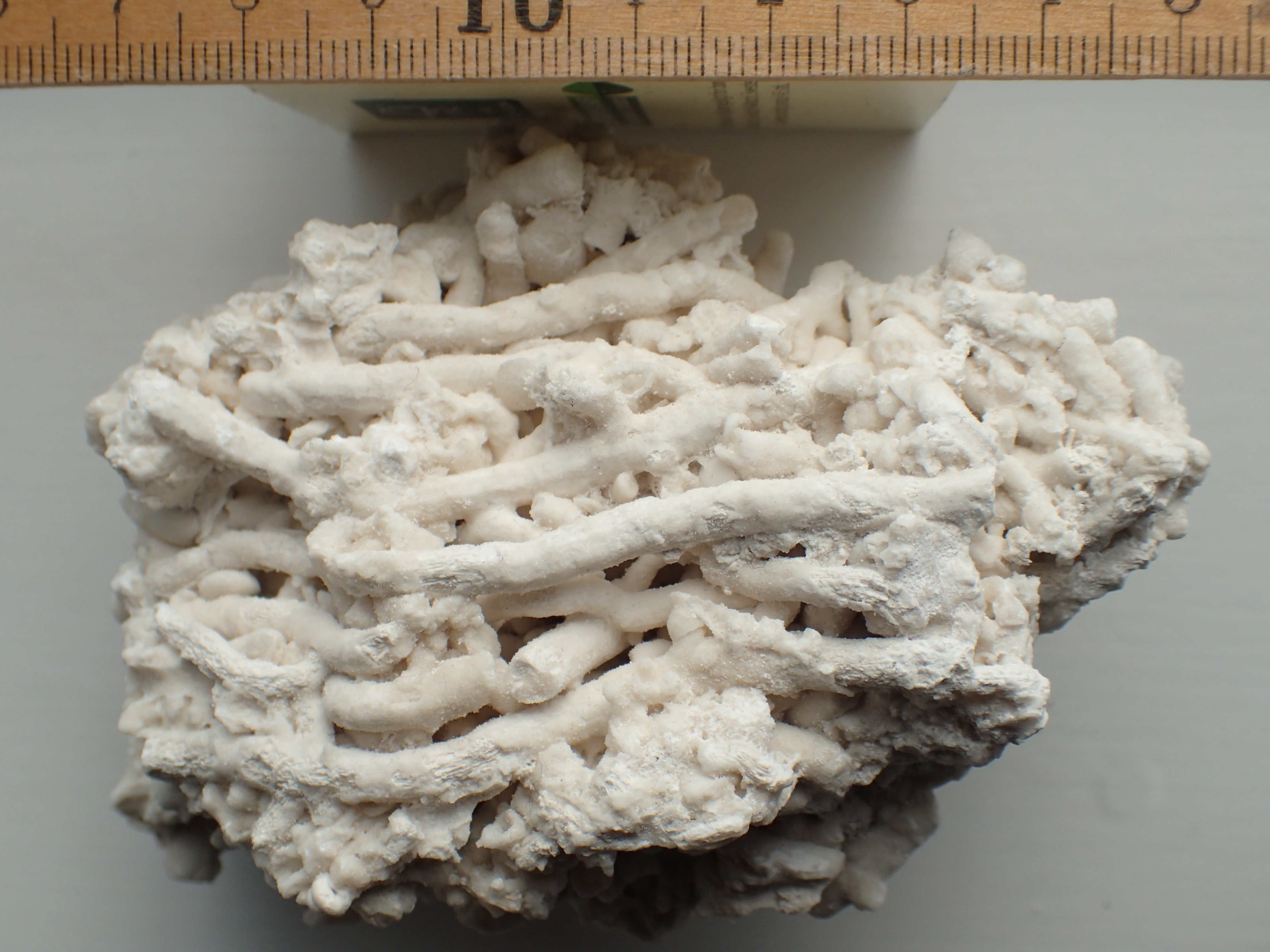 Koralkalk fra Faxe kalkbrud